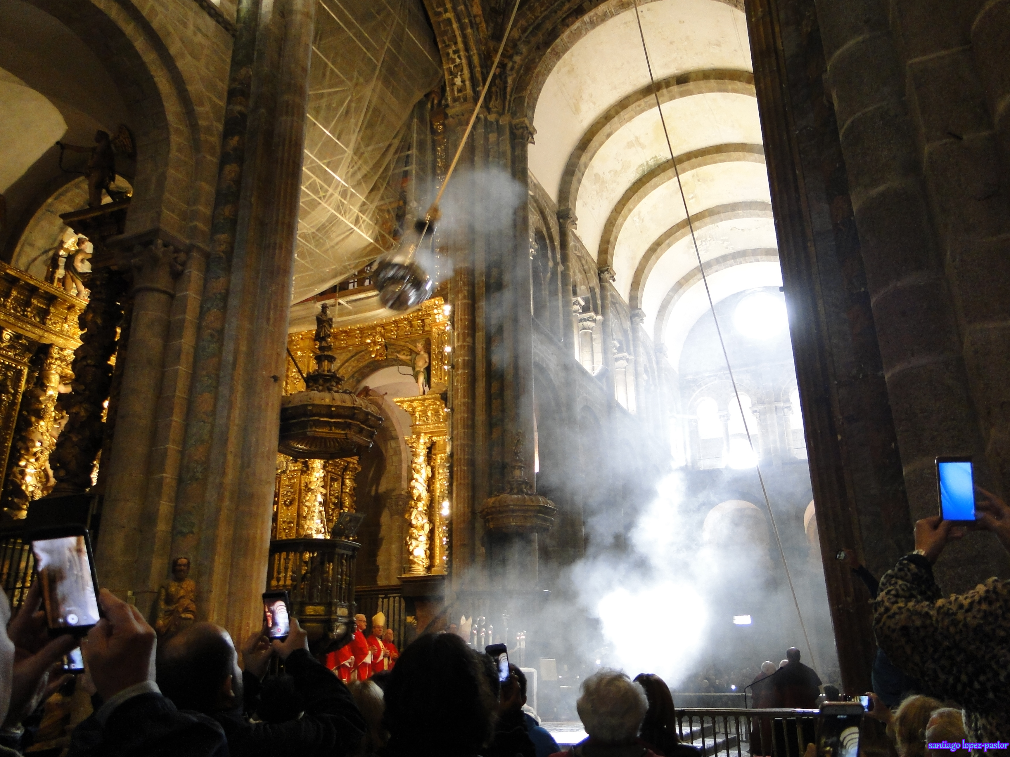 Santiago de Compostela